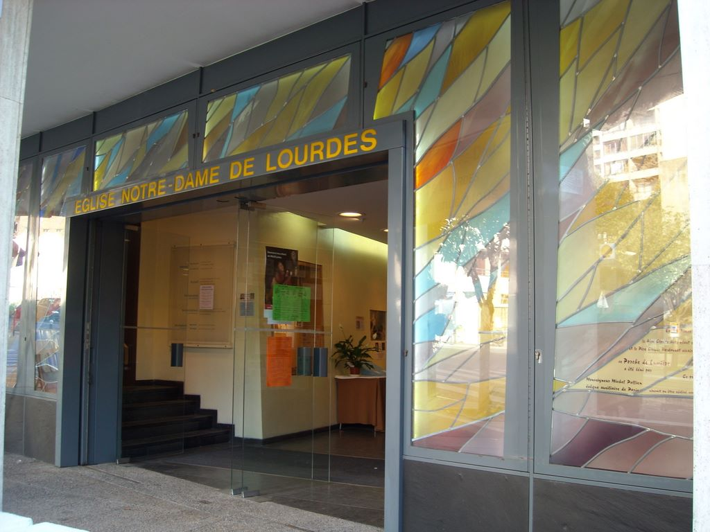 Entrée de l'église Notre Dame de Lourdes dans le 20e arrondissement de Paris